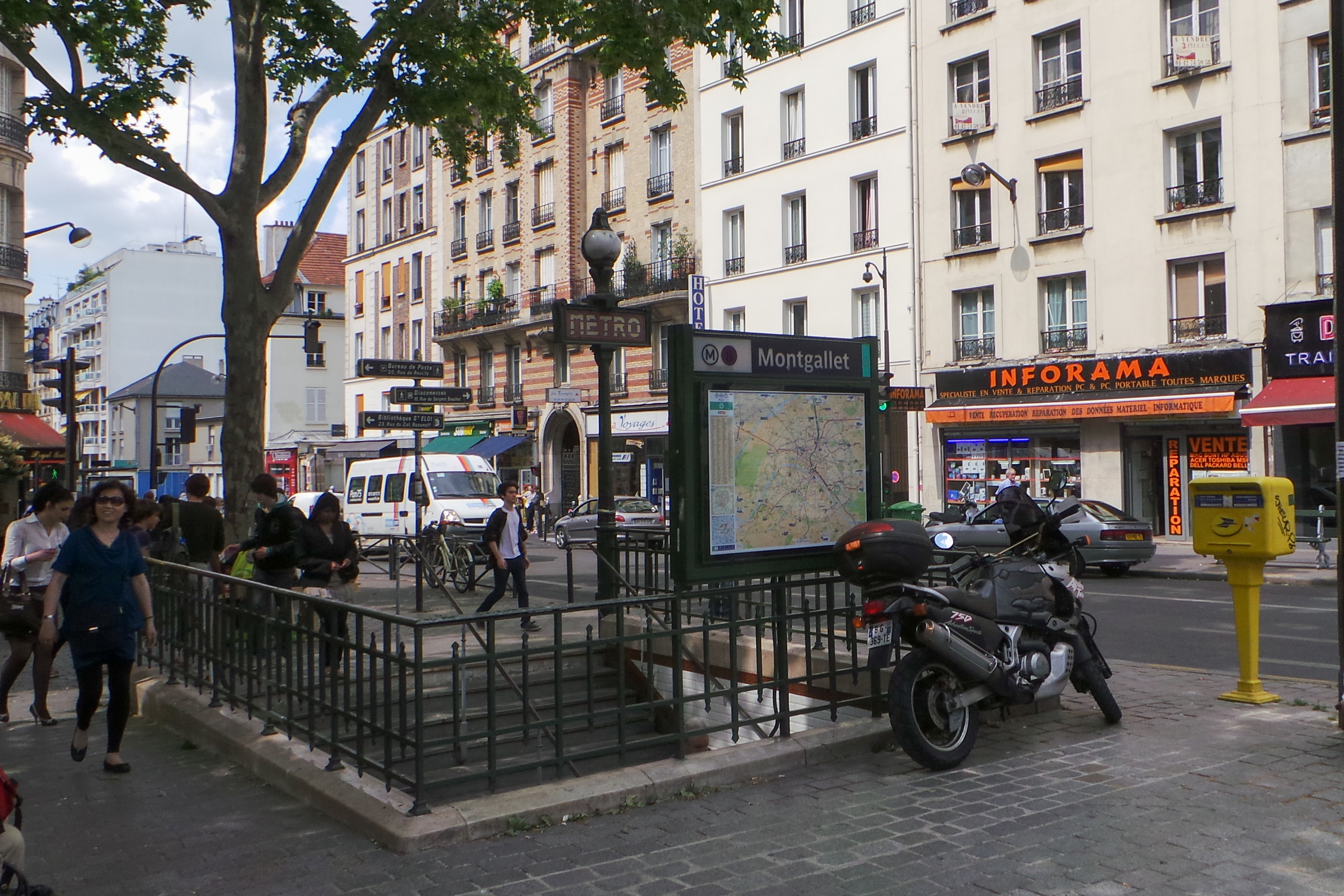 Station de métro Montgallet, ligne 8 du métro de Paris - Paris, France